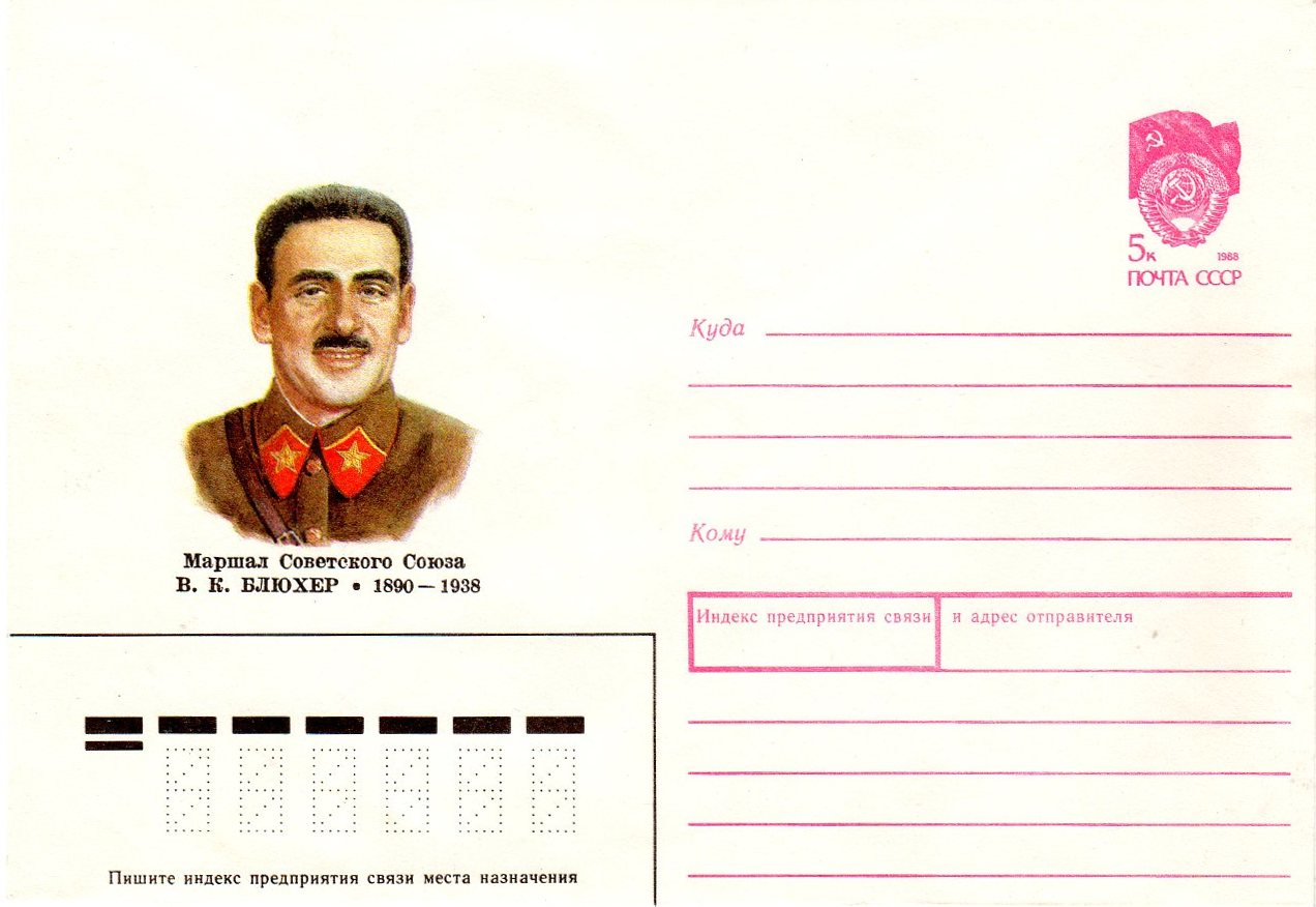 Блюхер Василий Константинович, почтовый конверт